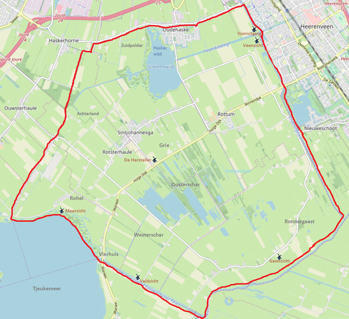 Groote Sintjohannesgasterveenpolder, voormalig waterschap in Friesland, kaart op basis van OpenStreetMap